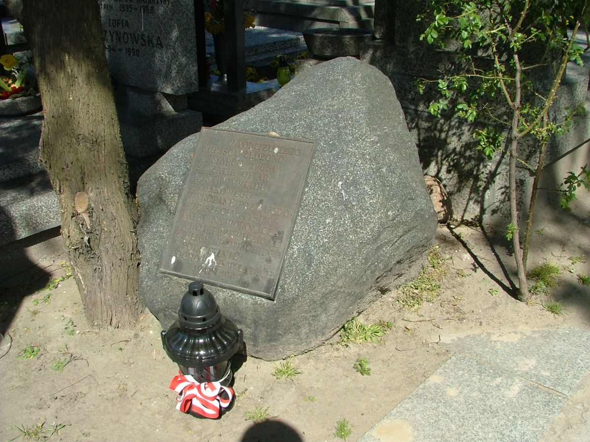 pl, Polska, Warszawa, Mokotów, Cmentarz na Służewie przy ul. Renety, przy terenach plebanii Kościoła św. Katarzyny